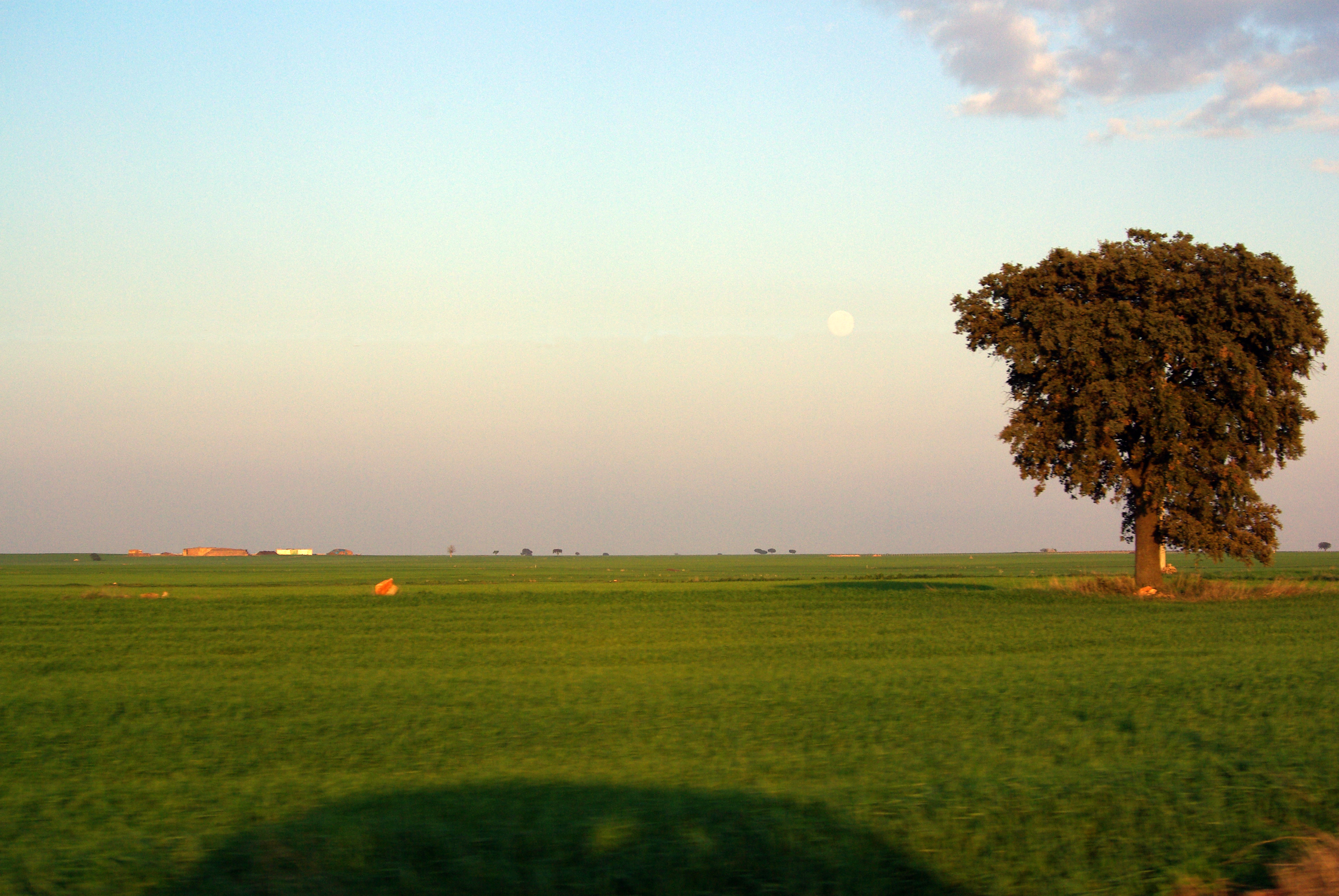 Paisaje de Albacete, Castilla-La Mancha desde un coche en marcha. Landscape of Albacete, Castilla-La Mancha took from a running car.